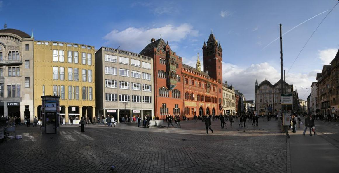 Marktplatz in Basel with Rathaus.